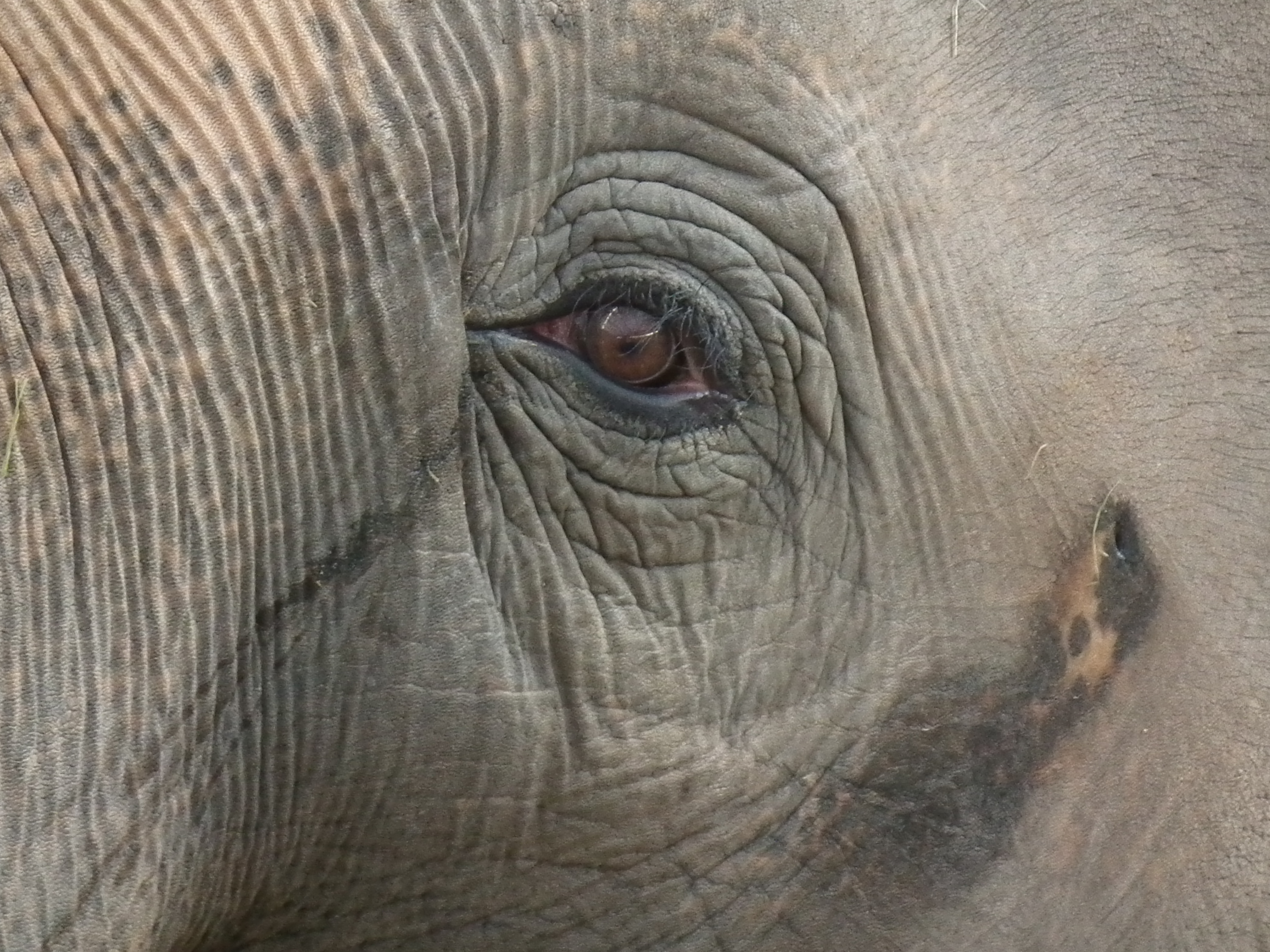 Auge und Schläfendrüse eines indischen Elefanten (Elephas maximus)